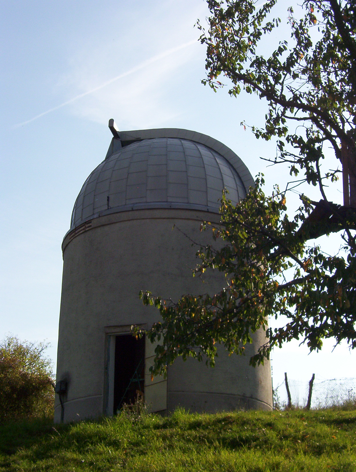 kupola Hlohovskej hvezdarne